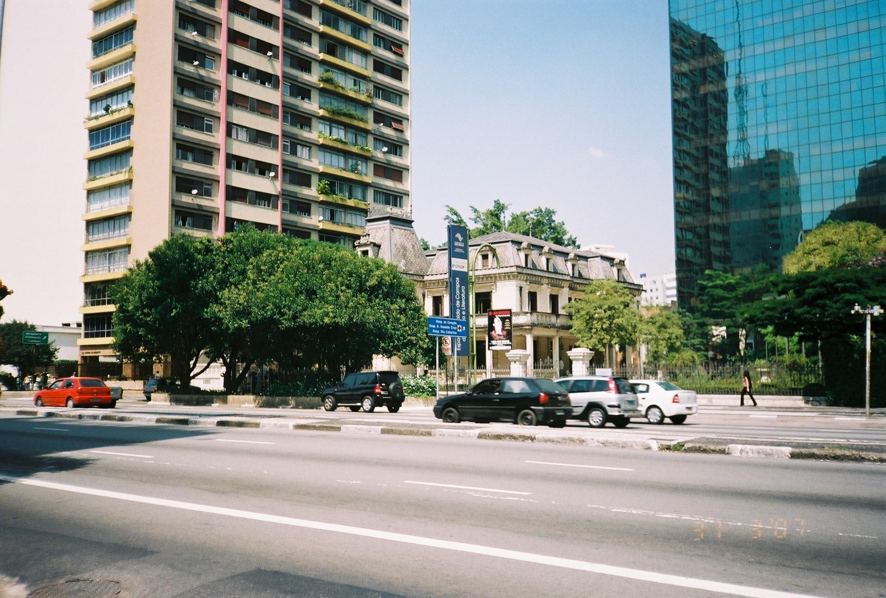 Casa das Rosas - localizada na avenida Paulista, número 37, em São Paulo,Brasil.